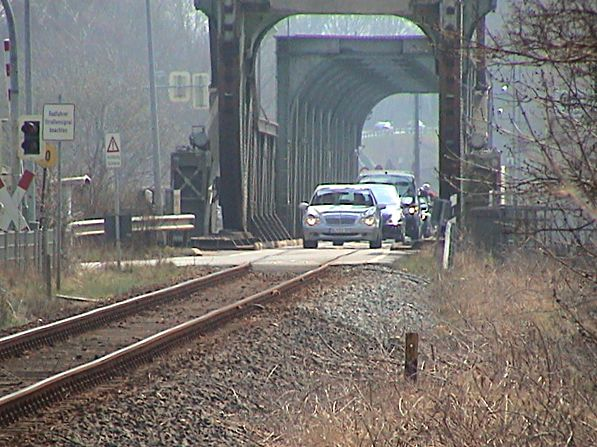 Lindaunisbrücke